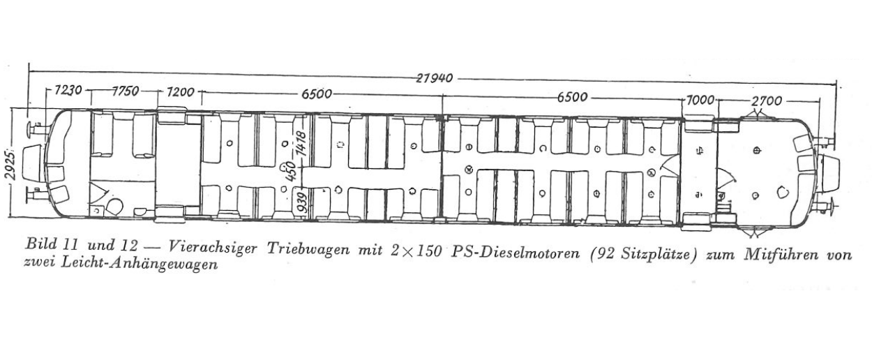 Maßskizze von den Privatbahntriebwagen nach WUMAG Bauart 4